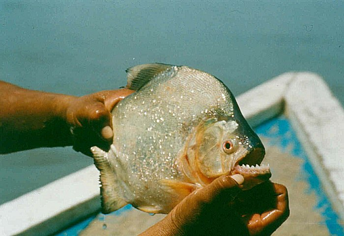 Piranha. Das Copyright des Bildes liegt bei mir. Das Bild habe ich selbst 2001 gemacht und das Original befindet sich in meinem Besitz.